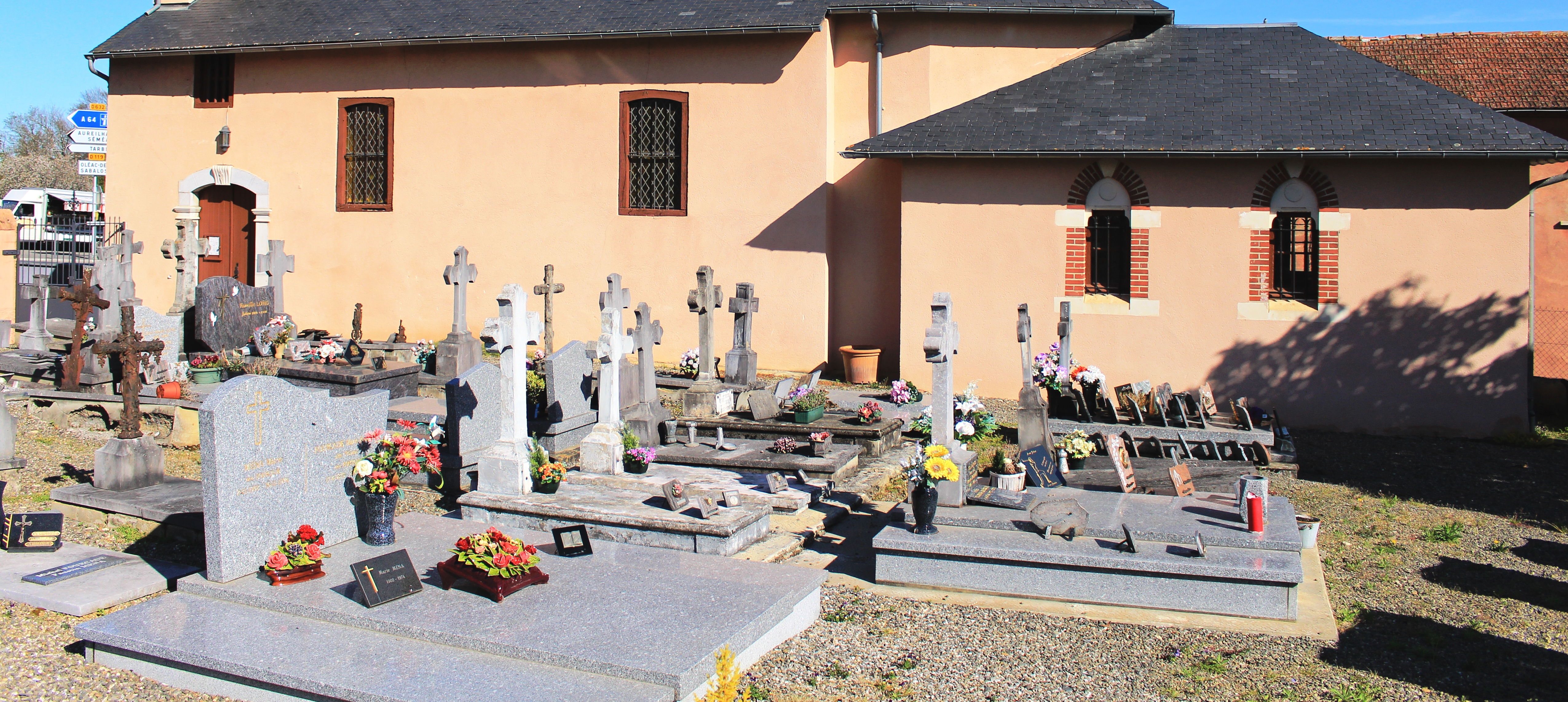 Cimetière de Boulin (Hautes-Pyrénées)